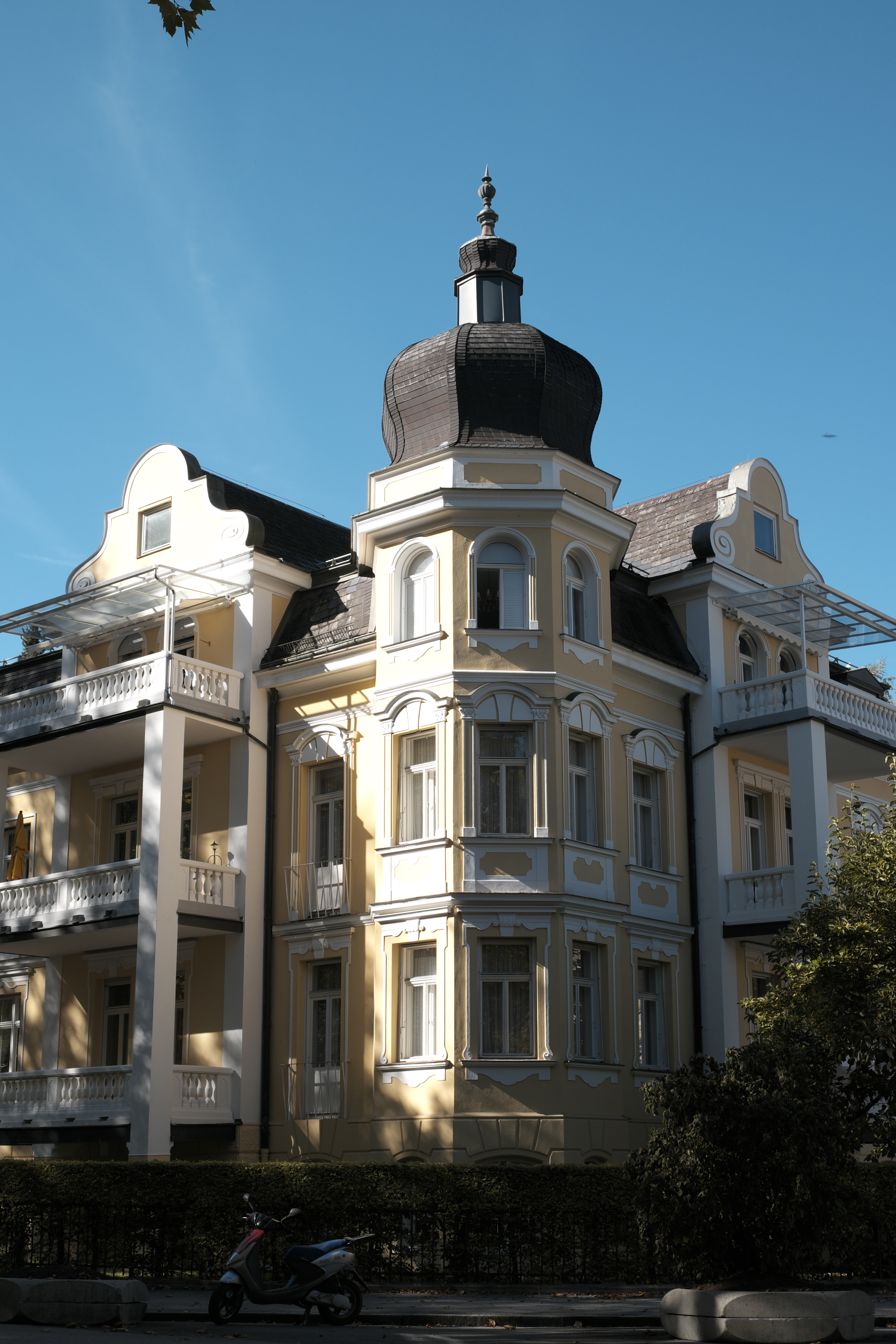 Villa, Mozartstraße 10, im Kurviertel in Bad Reichenhall im Landkreis Berchtesgadener Land (Bayern/Deutschland)